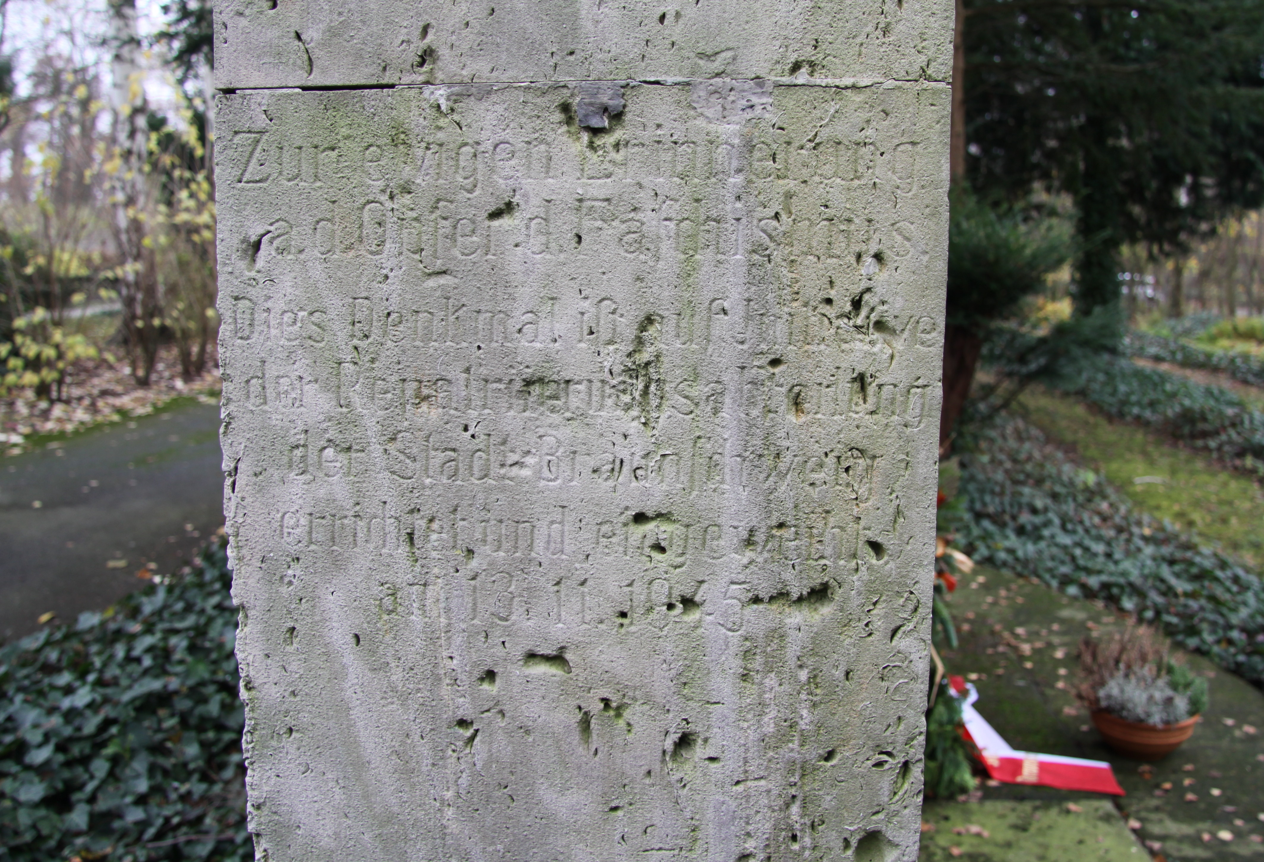 Deutscher Text des Sowjetischen Ehrenmals auf der linken Seite: Zur ewigen Erinnerung a. d. Opfer d. Faschismus. Dies Denkmal ist auf Initiative der Repatriierungsabteilung der Stadt Braunschweig errichtet und eingeweiht am 13. 11. 1945. (Der Text in russischer Sprache befindet sich auf der rechten Seite des Ehrenmals).